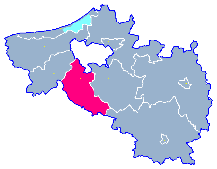 Locator maps for communes in województwo zachodniopomorskie : Świeszyno gm.png (podział na gminy)